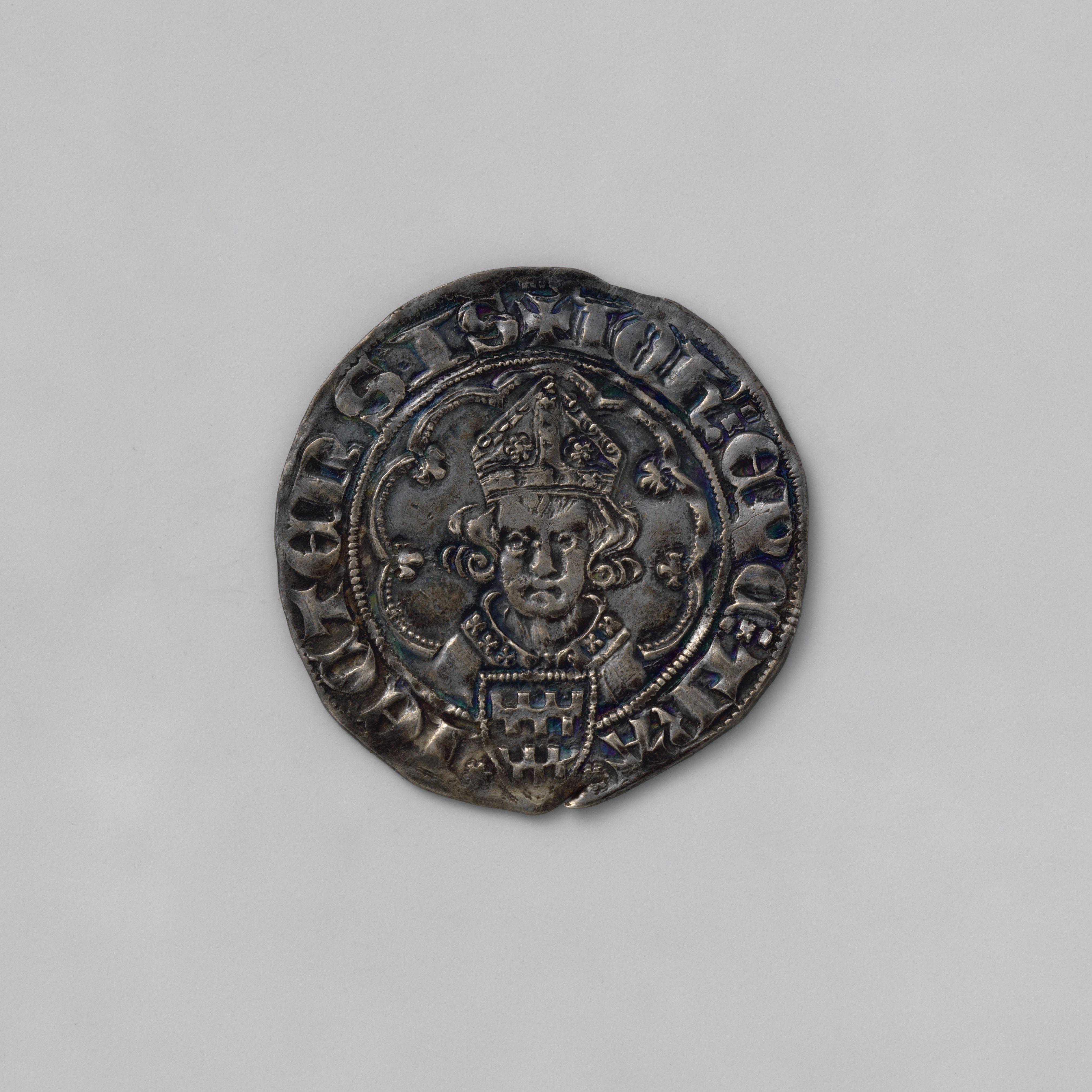 IdentificatieTitel(s): Utrechtse groot van Jan van Arkel, 1341-1364. Utrecht, Jan van Arkel, grootObjecttype: munt Objectnummer: KOG-MP-1-1775Omschrijving: Voorzijde: binnen versierde veelpas aanziend portret van de bisschop met mijter met voor zich wapenschild van Arkel.Keerzijde: halflang gevoet kruis. Dubbel omschrift.VervaardigingVervaardiger: muntheer: Hendrik I van ViandenPlaats vervaardiging: UtrechtDatering: 1341 - 1364Materiaal: zilver Techniek: slaanAfmetingen: d 2,6 × g 2,55Verwerving en rechtenCredit line: Bruikleen van het Koninklijk Oudheidkundig GenootschapVerwerving: bruikleen 28-feb-2012Copyright: Publiek domein